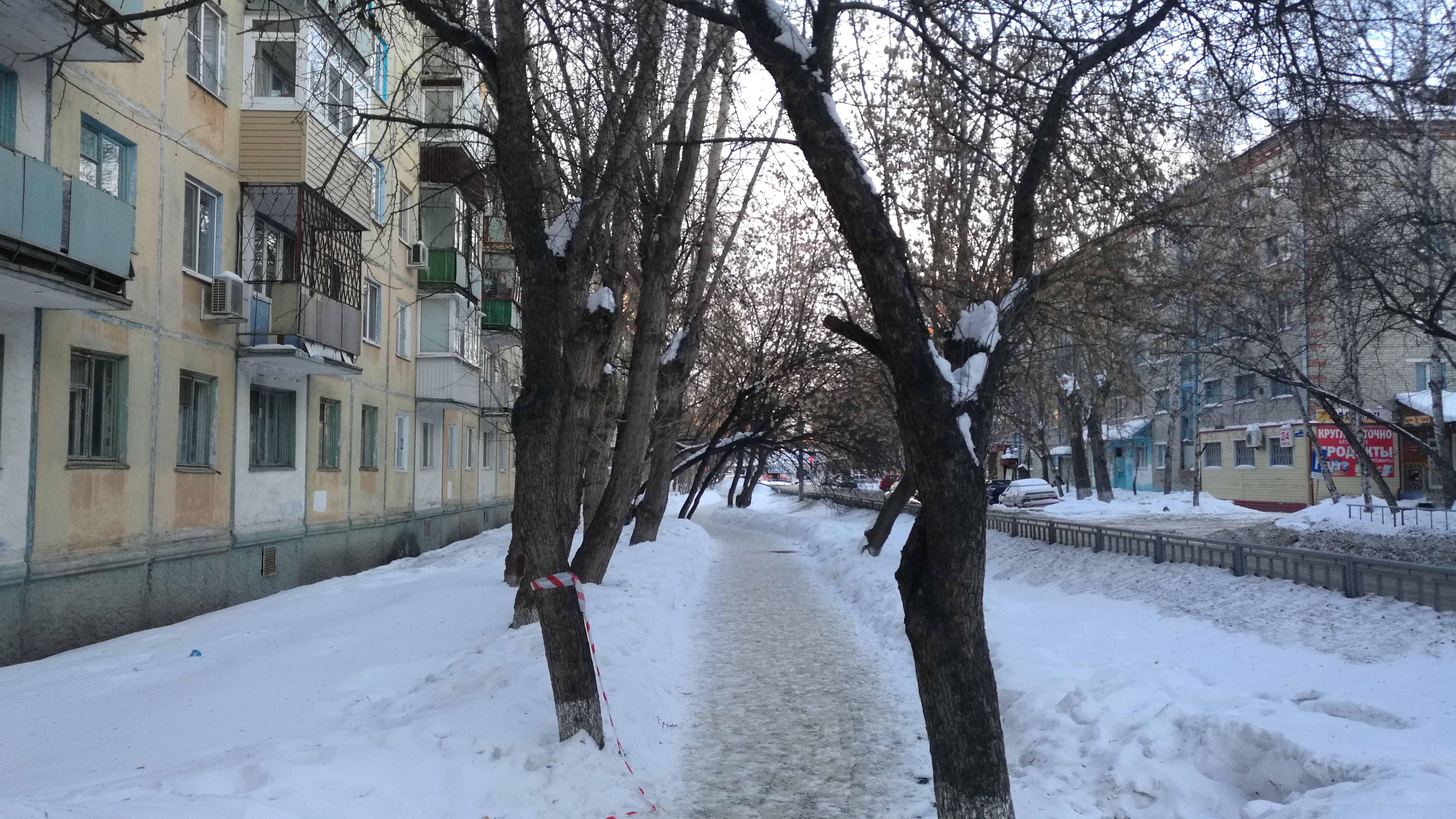 Pado laŭlonge de loĝdomo en strato Fabriĉnaja, 17. Tjumeno, Rusio.